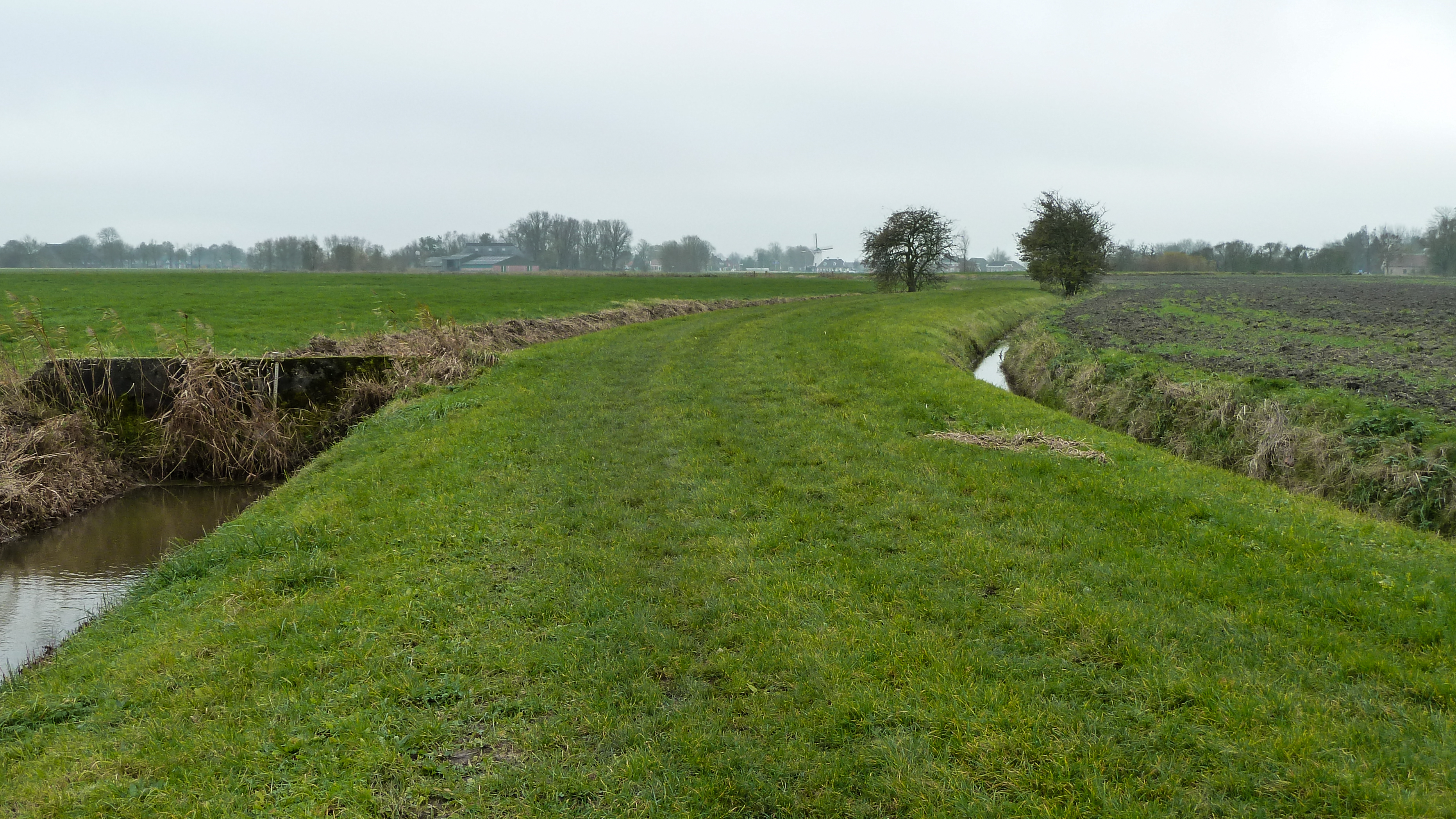 Stadsweg bij Tammingahuizen